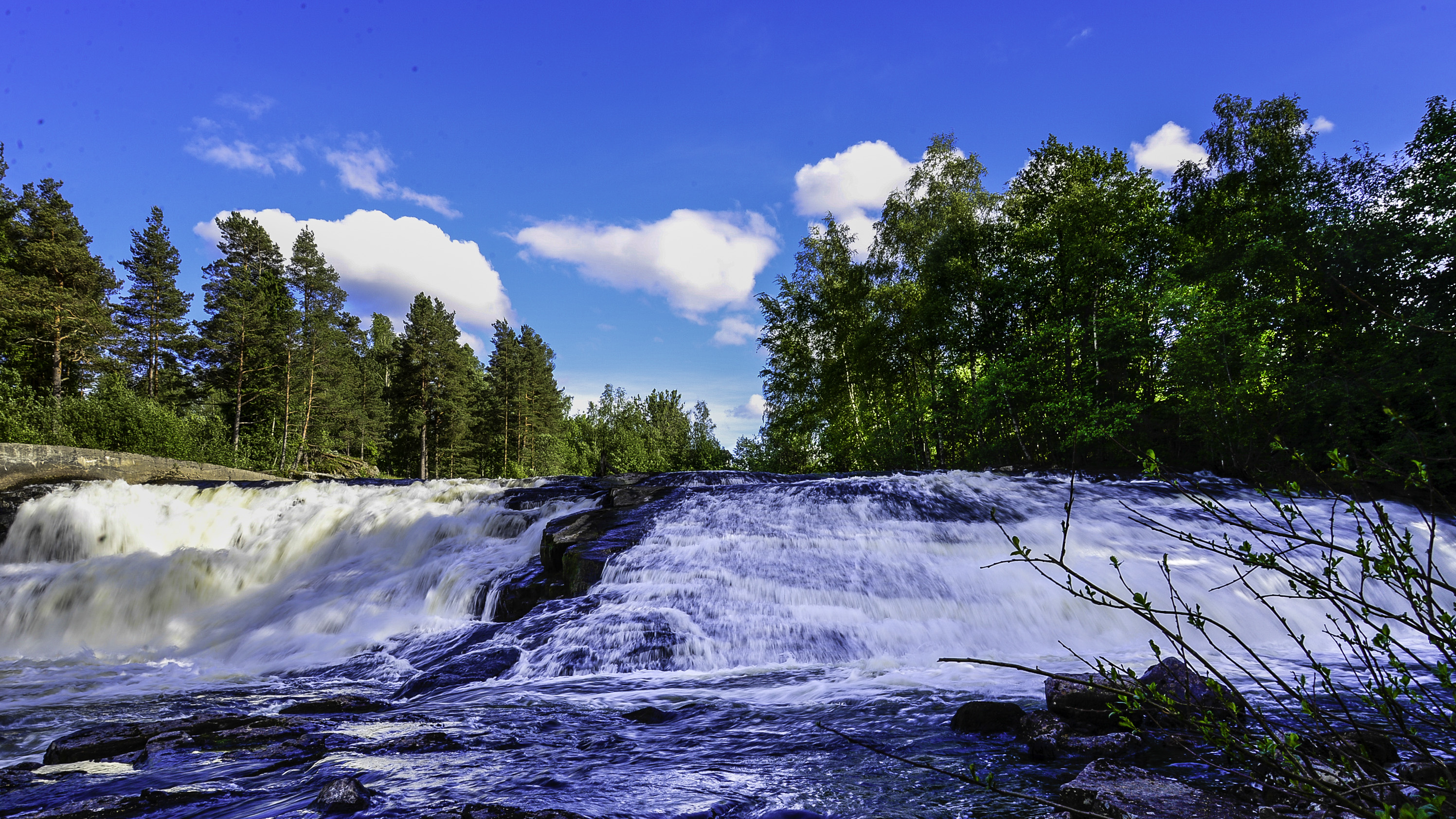 Oterholtfossen, Bø i Telemark